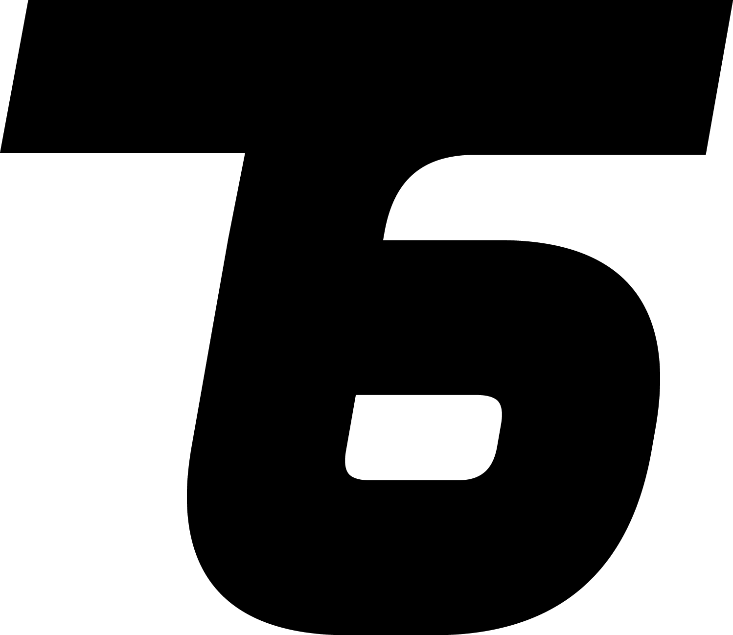 Это логотип компании